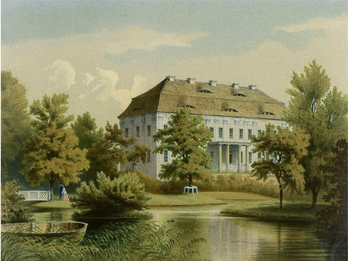 Schloss Dretzel, Kreis Jerichow II, Provinz Sachsen